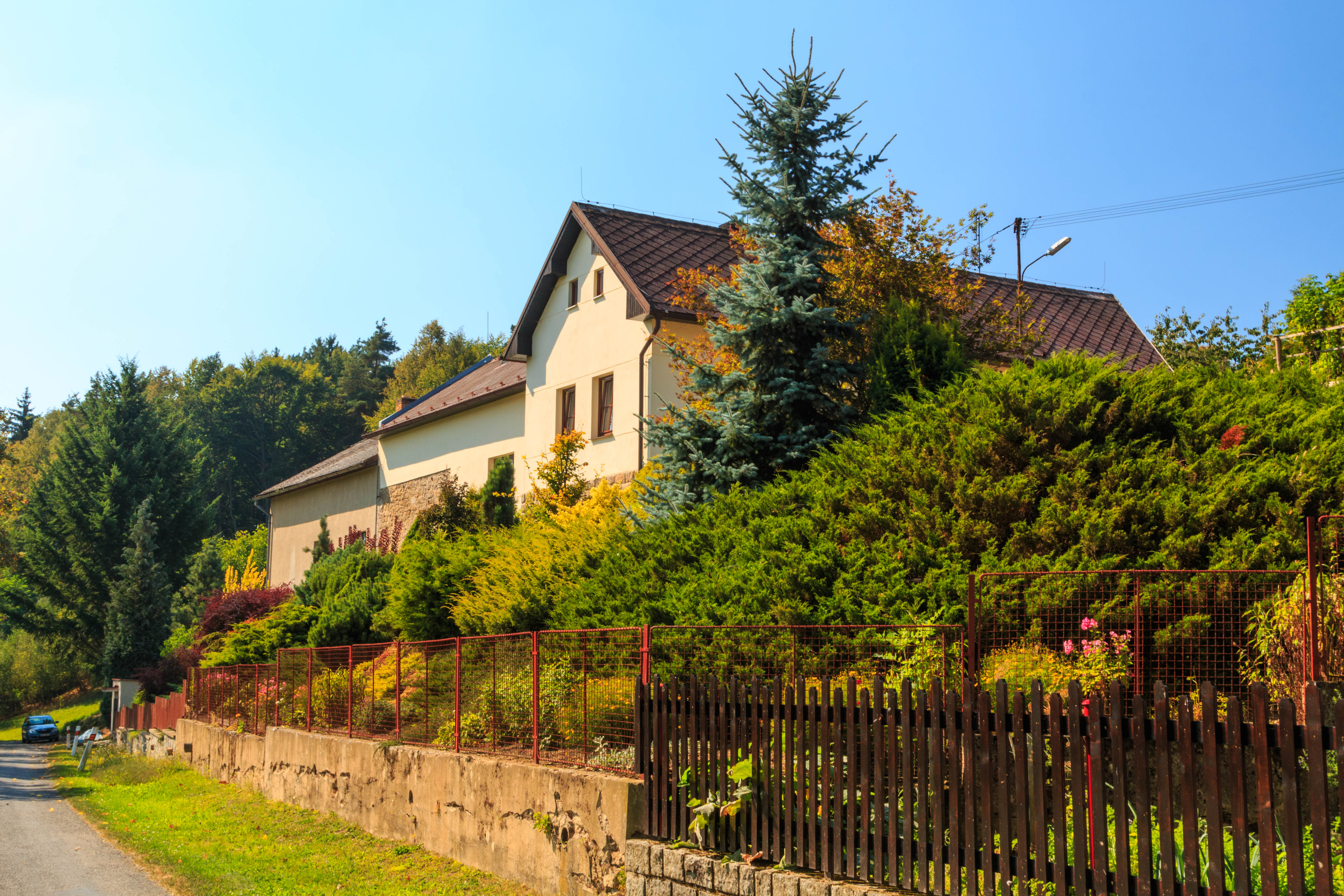 Pusté Lhotsko - č. 9